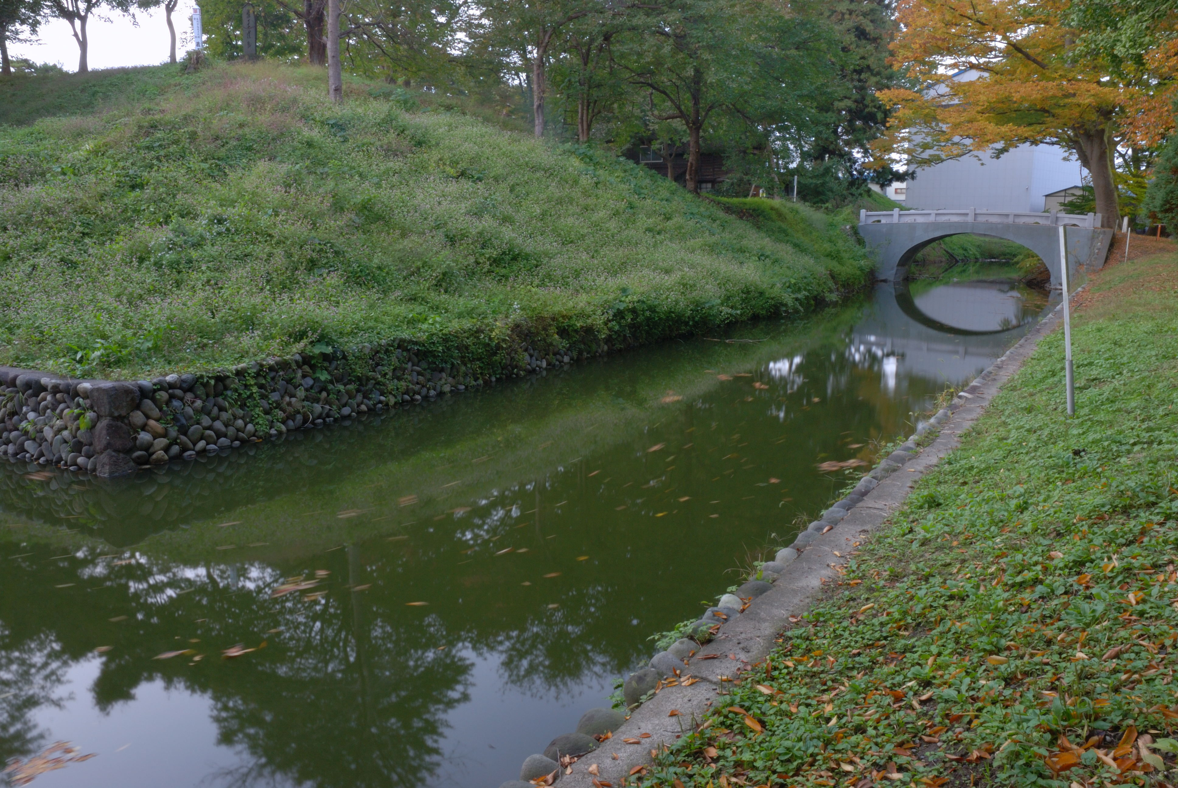 Zaodo castle hori